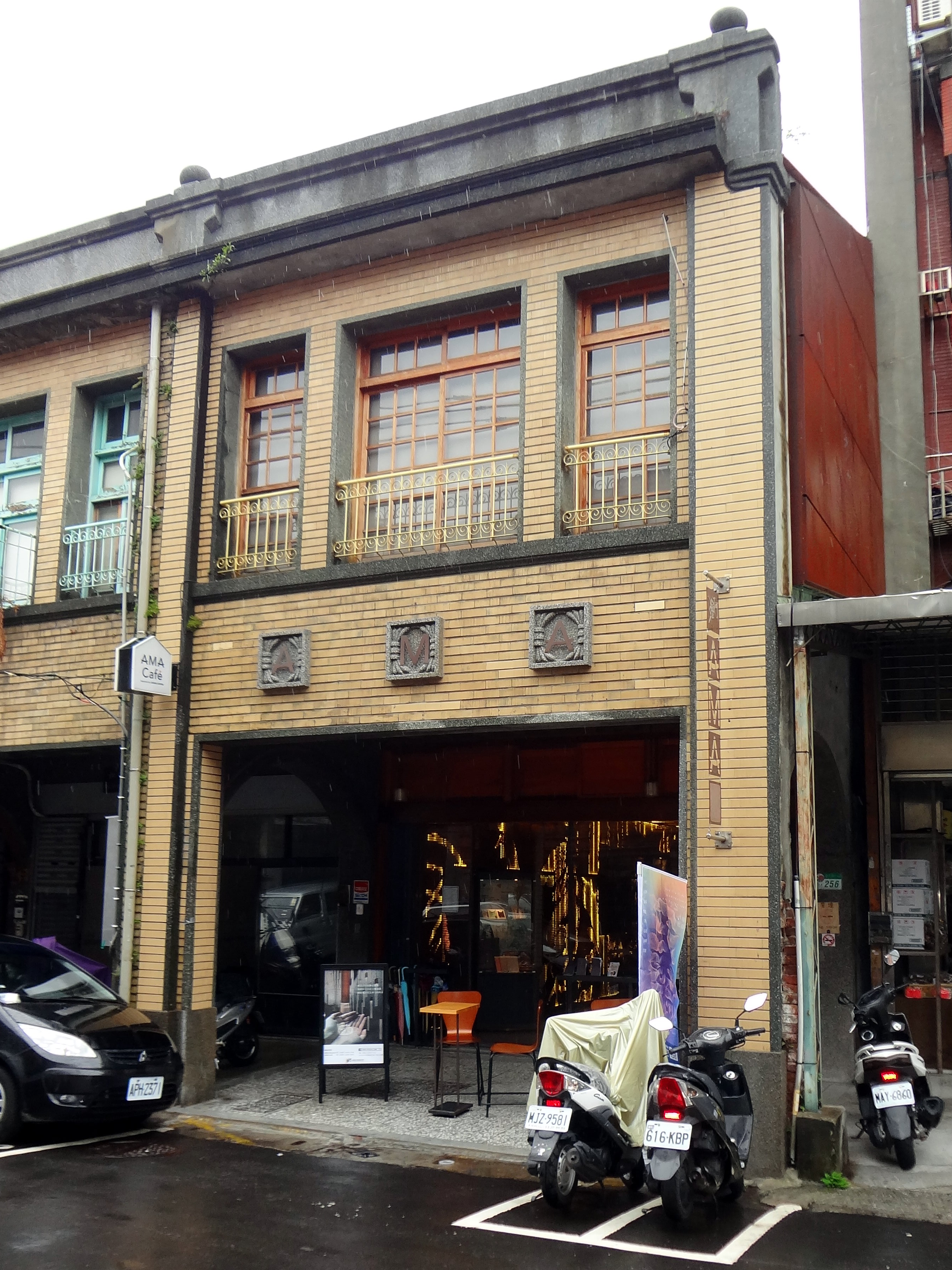 雨中的阿嬤家-和平與女性人權館。